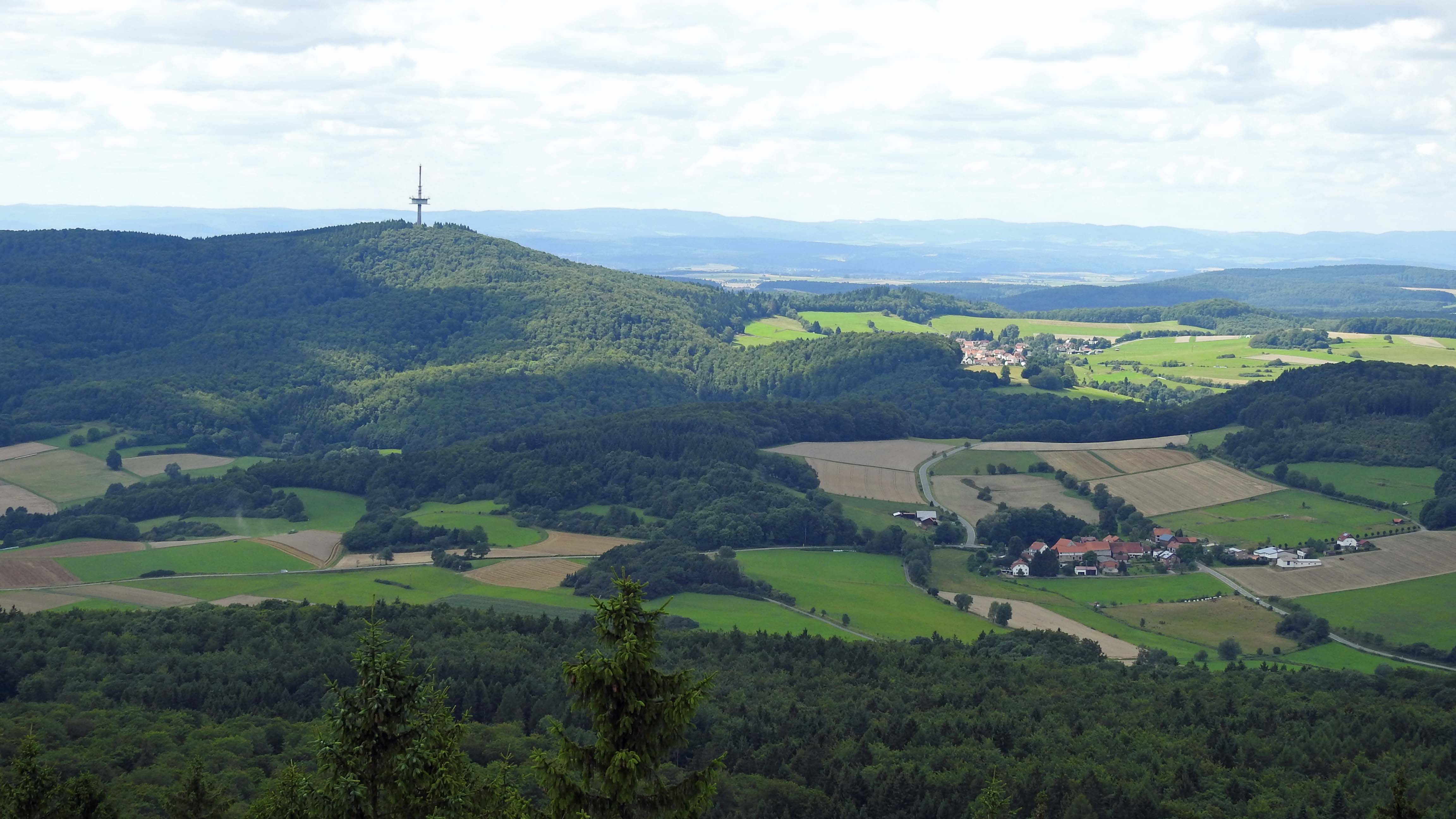 Haddenberg, Haina (Kloster), von Osten